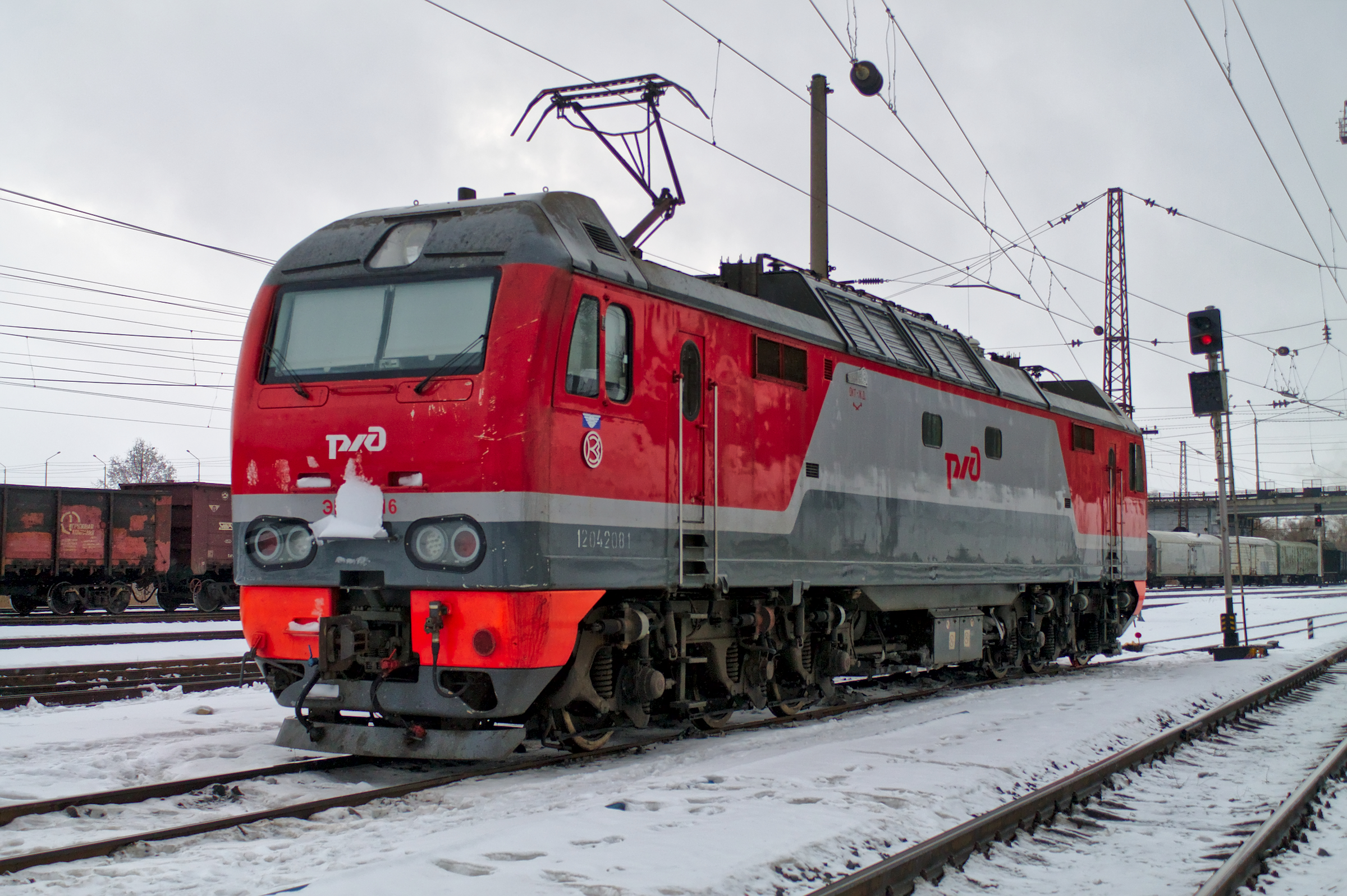 ЭП2К-216, станция Владимир. см. фото 637267 в альбоме автора